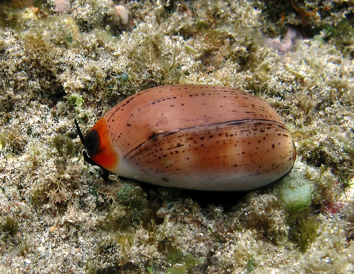 Le gastéropode Luria isabella à la Réunion.